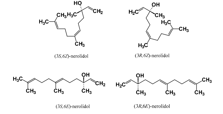 Elle décrit les isomères du Nerolidol